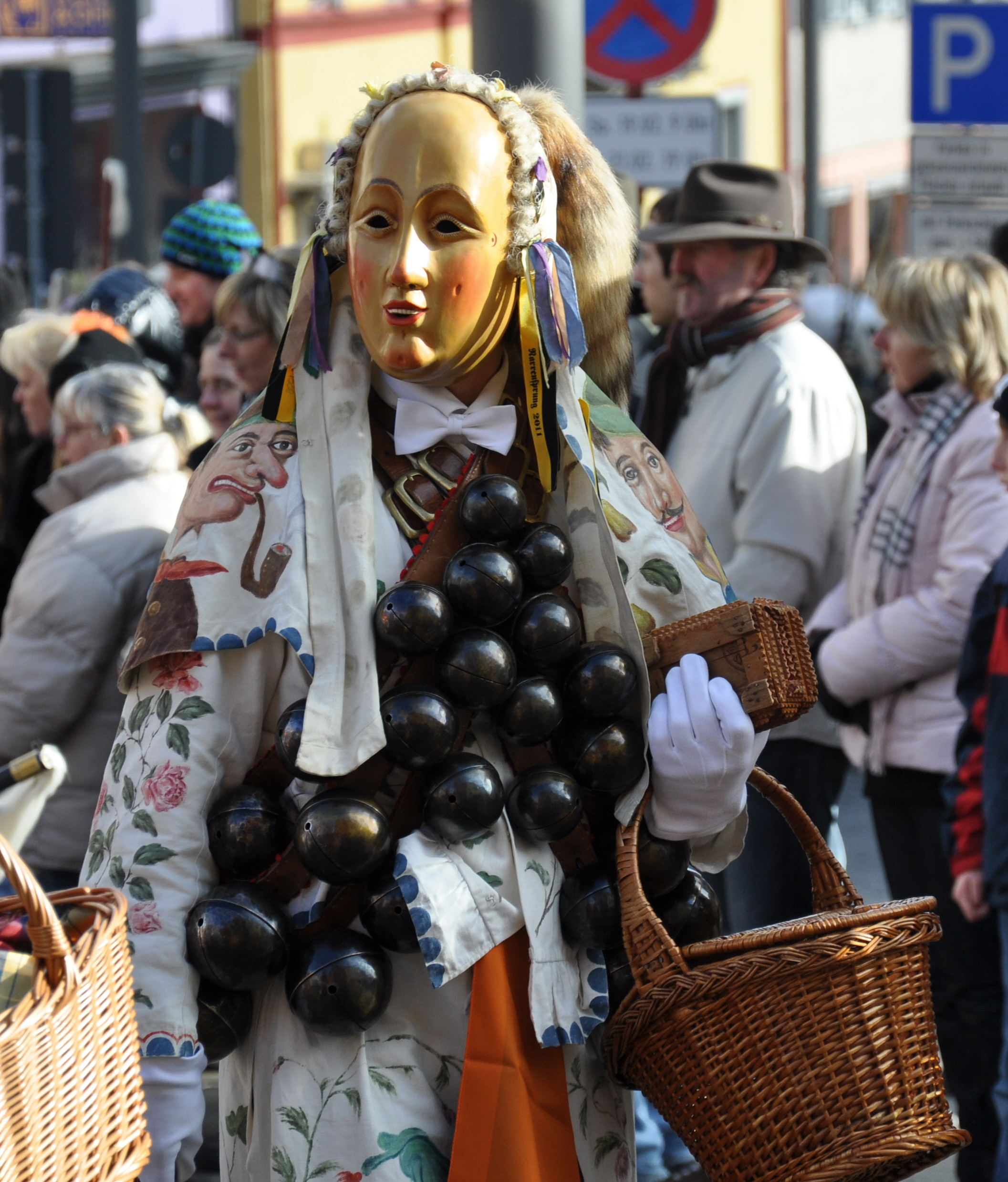 Rottweil, Narrensprung am Fasnetsmontag 2012 Gschell